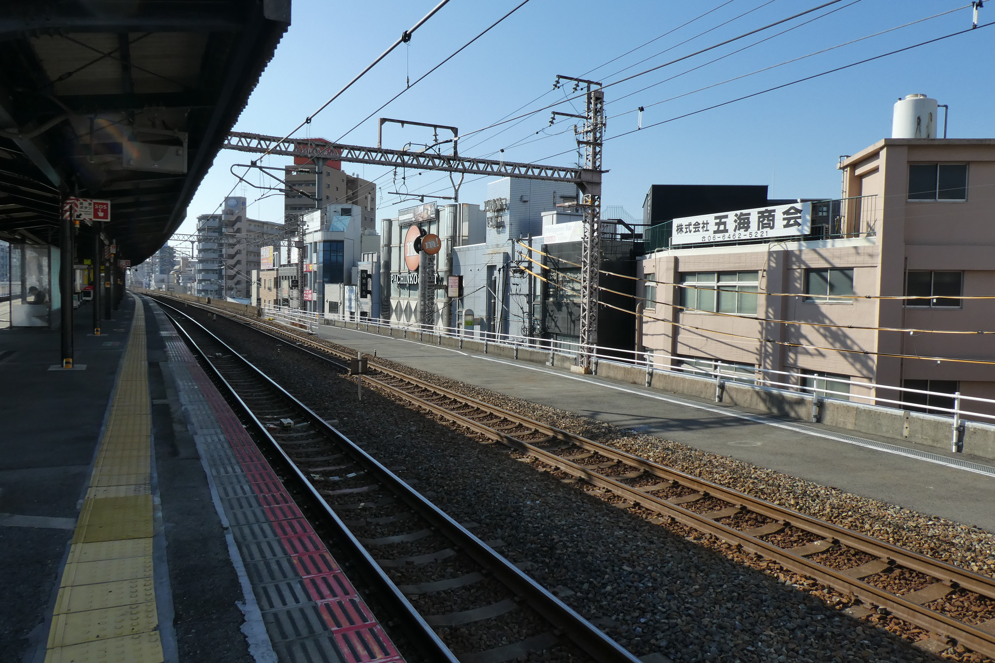 大阪環状線 野田駅から大阪市場駅へ分岐していた貨物支線跡。